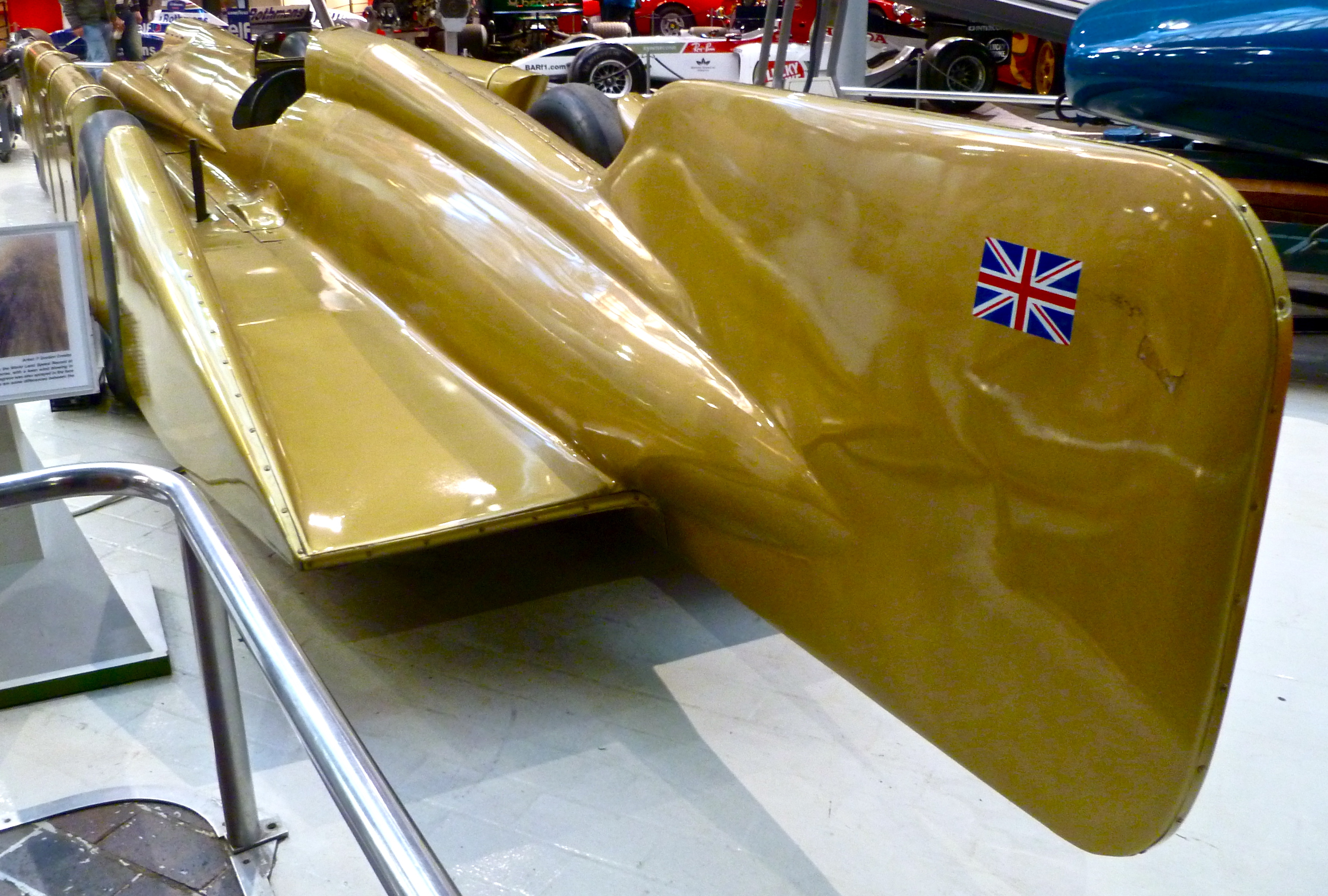 Segrave's Golden Arrow, Beaulieu Motor Museum